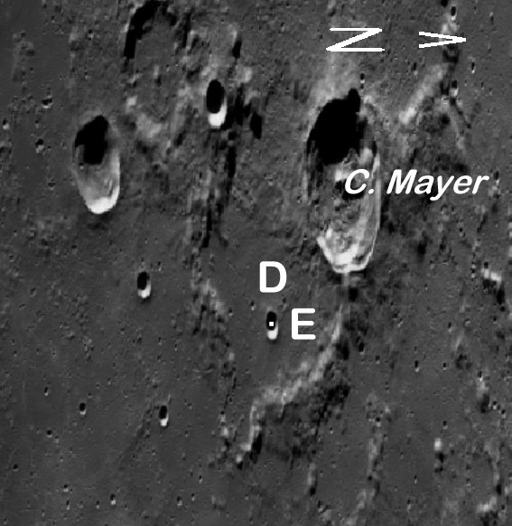 Cráter satélite C. Mayer D. (Imagen LRO). Su silueta recuerda al mapa de Brasil.